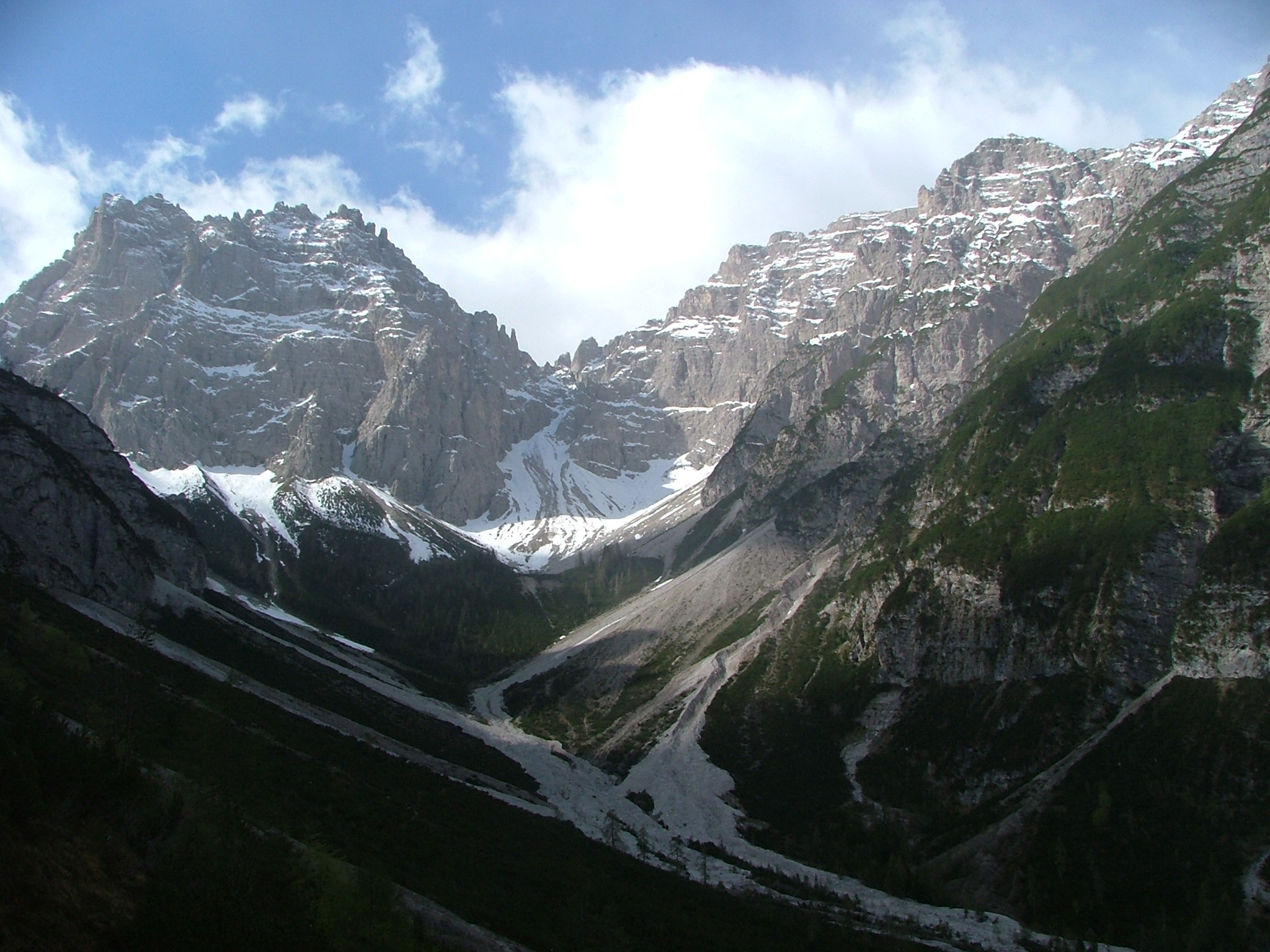 Monte Cridola at Lorenzago di Cadore, Belluno, Dolomites, Veneto, Italy